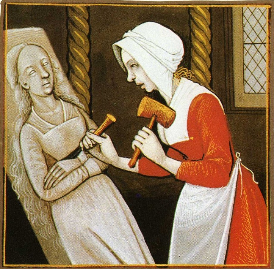 Marcia sculpting. Boccacio, de mulieribus claris/Le livre de femmes nobles et renomées (trad. anonyme), 15-16th century, France (Cognac). Bibliothèque Nationale MS Français 599 fol. 58.